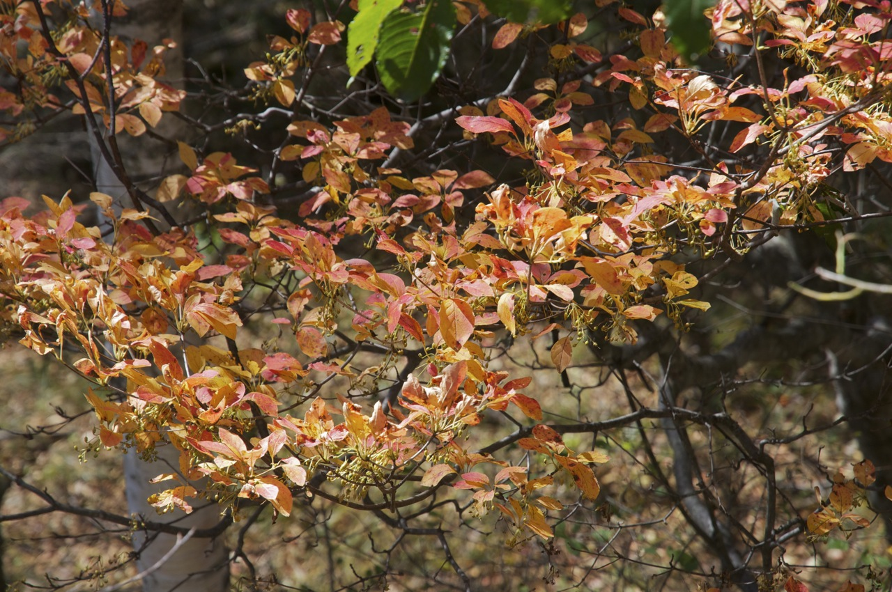 Enkianthus campanulatus (Sarasadoudan)